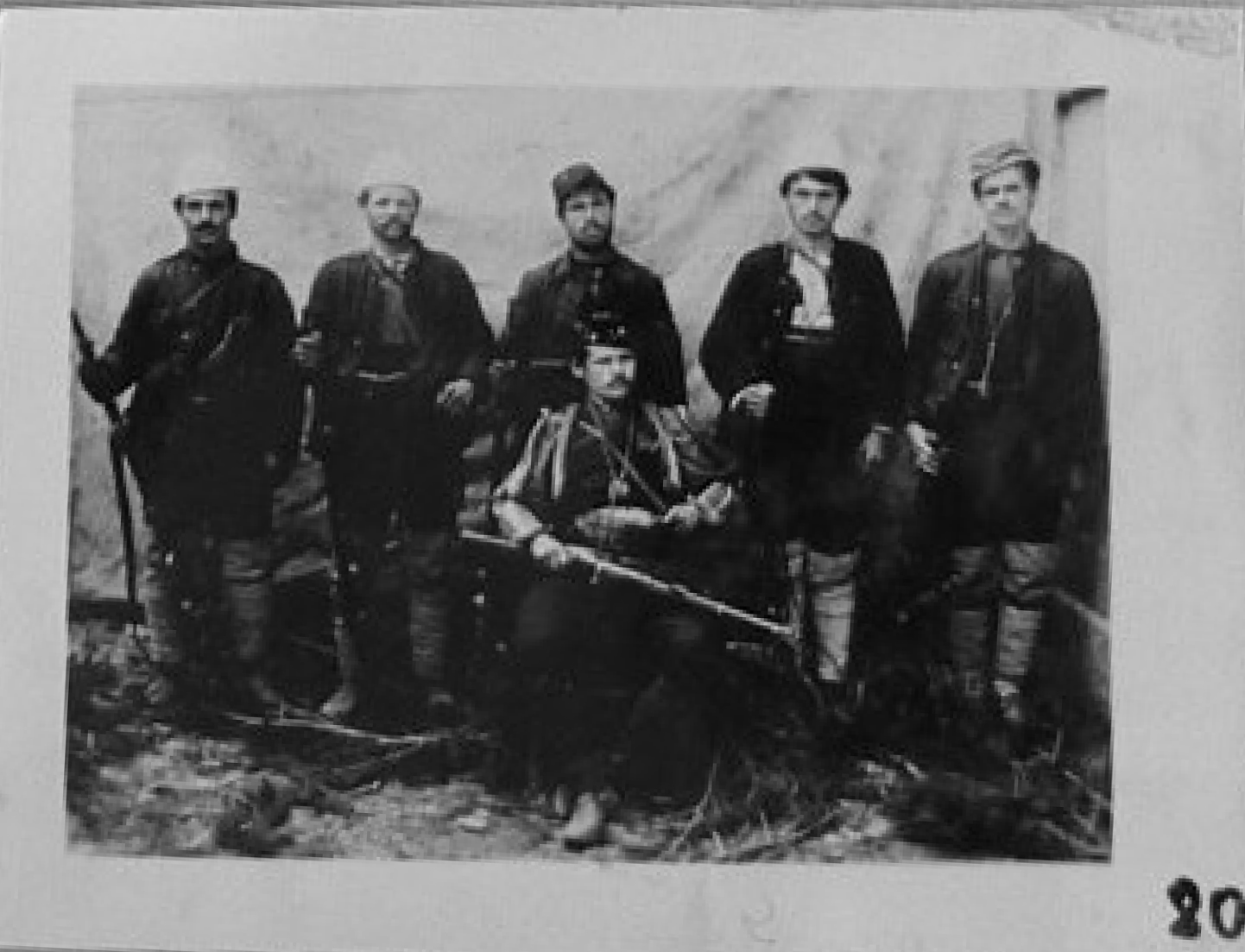 Ангел Секулов Базернишки (седнал).